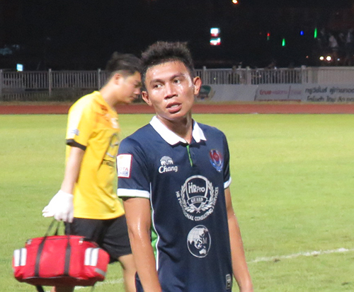 Suttipong Laoporn